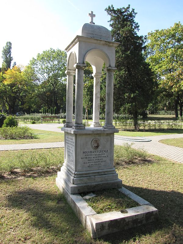 Holubán Ferenc (1886 - 1945. március 6.) 1908-ban Londonban kötöttfogású bírkózásban (könnyűsúly: 68 kg) bronzérmet nyerő sportoló sírja Budapesten. Kerepesi temető: 44/1-1-72